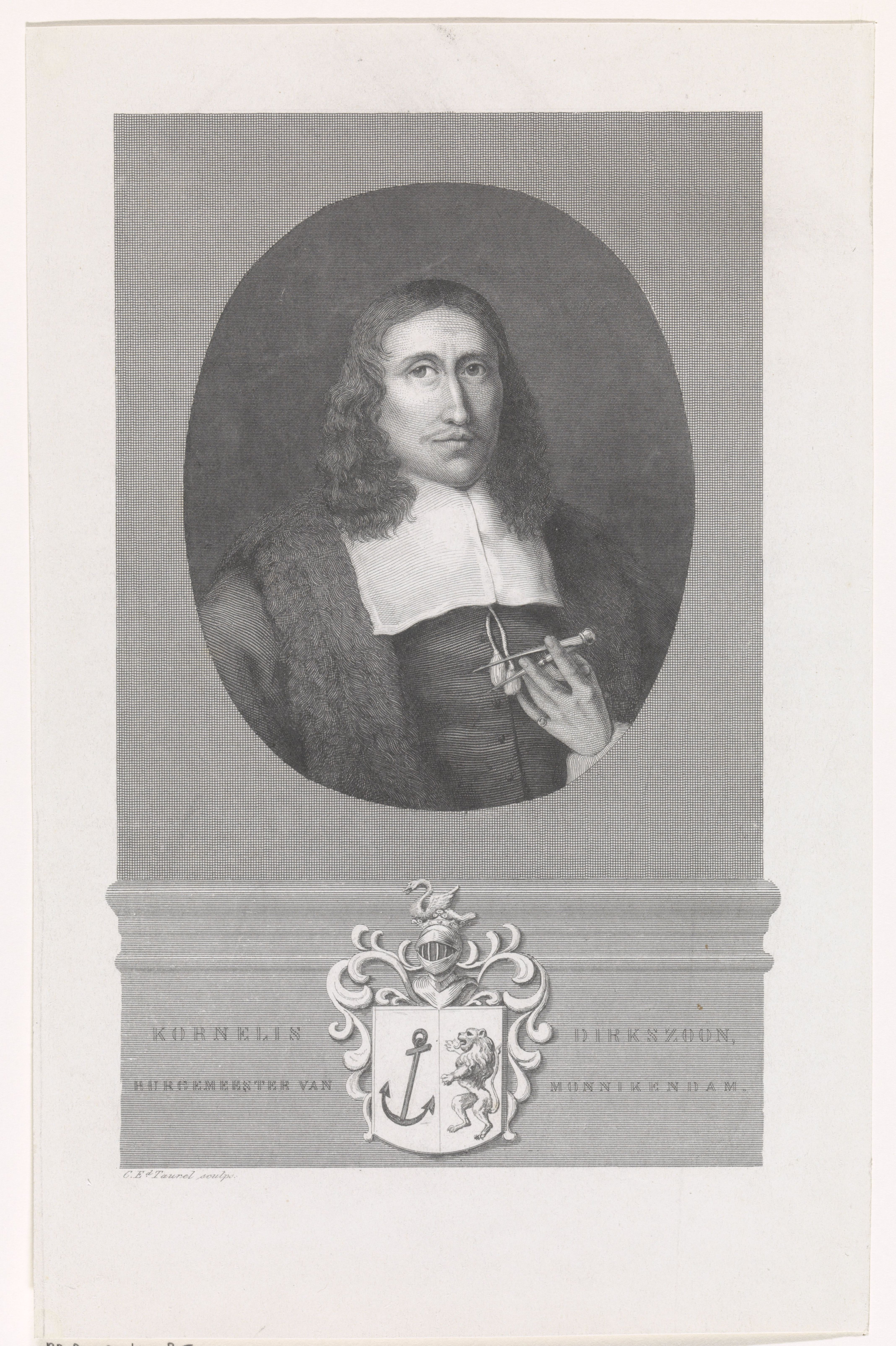 IdentificatieTitel(s): Portret van de burgmeester te Monnickendam Cornelis DirkszObjecttype: prent Objectnummer: RP-P-OB-19.785VervaardigingVervaardiger: prentmaker: Edouard Taurel (vermeld op object)Plaats vervaardiging: AmsterdamDatering: 1841 - 1879Fysieke kenmerken: staalgravureMateriaal: papier Techniek: staalgravureAfmetingen: blad: h 255 mm × b 165 mmToelichtingPrent ook gebruikt als illustratie voor: Arend, Johannes Pieter. Algemeene geschiedenis des vaderlands van de vroegste tijden tot op heden. 5 delen. Amsterdam: J.F. Schleijer, 1841-1884. dl. II.6, p. 9.OnderwerpWie: Cornelis DirkszVerwerving en rechtenVerwerving: onbekendCopyright: Publiek domein